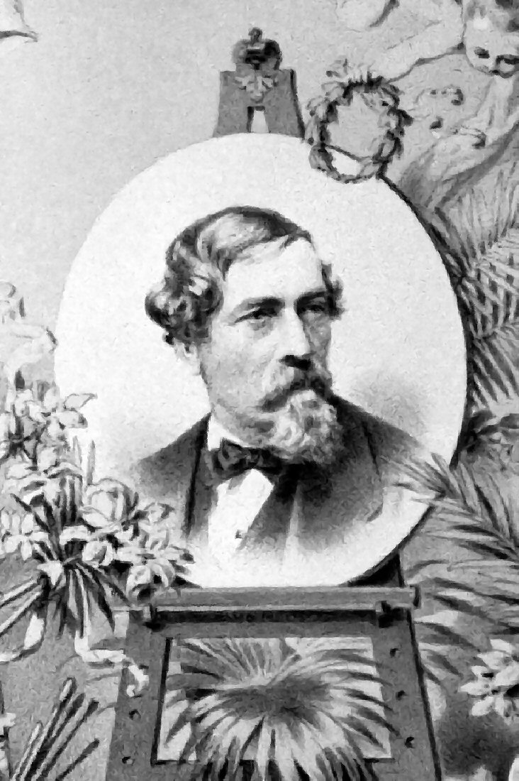 August Prinzhofer, Detail eines lithographierten Gedenkblattes von Franz Würbel